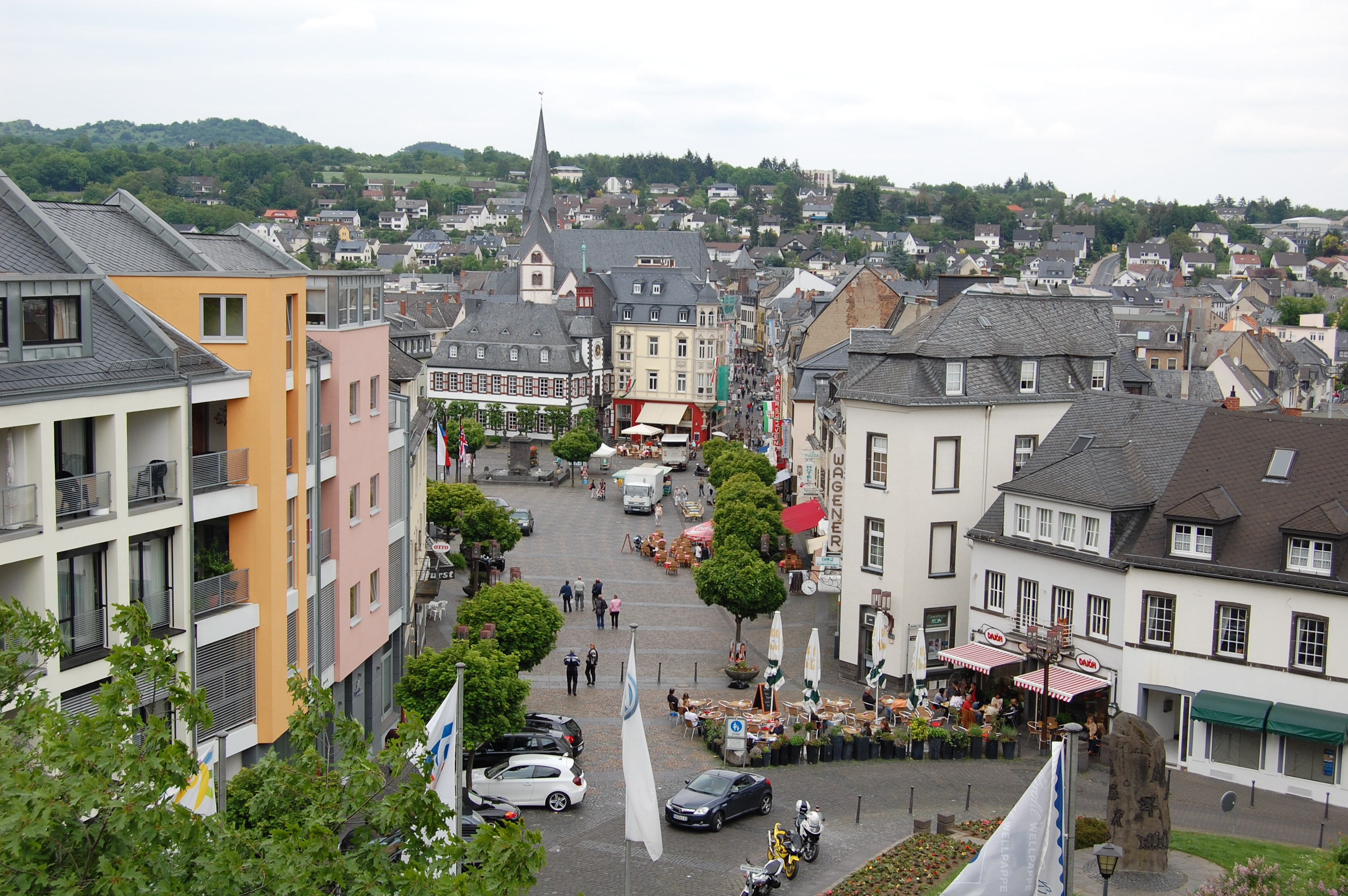 Marktplatz von Mayen